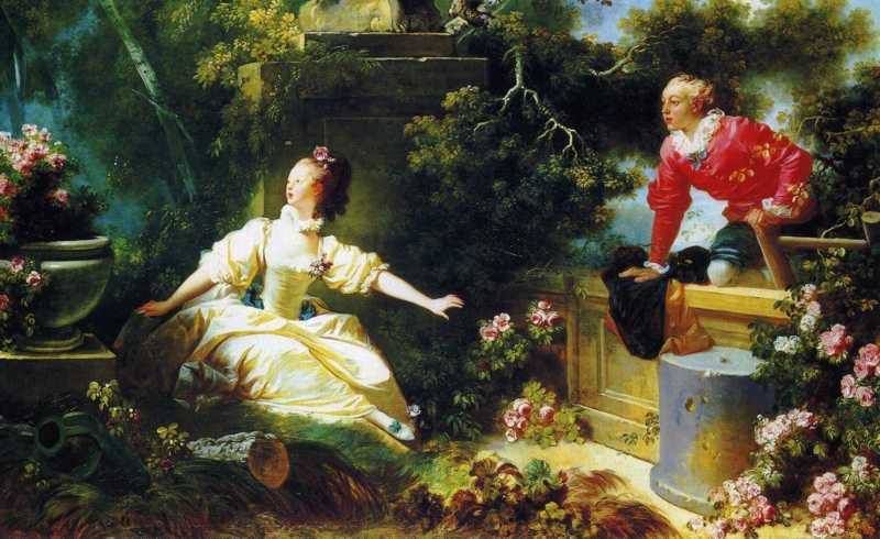 О.Фрагонар "Встреча" Картина, написанная в жанре галантной сцены, в стиле рококо.